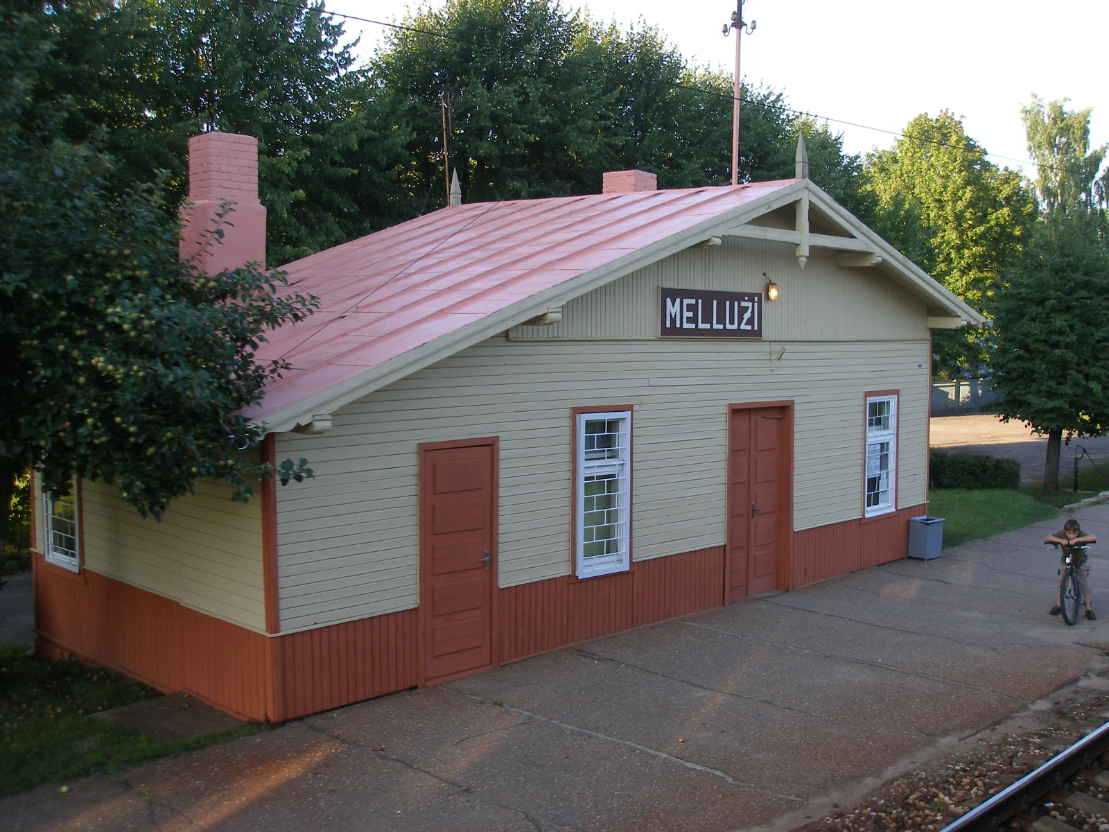 Mellužu stacijas ēka.